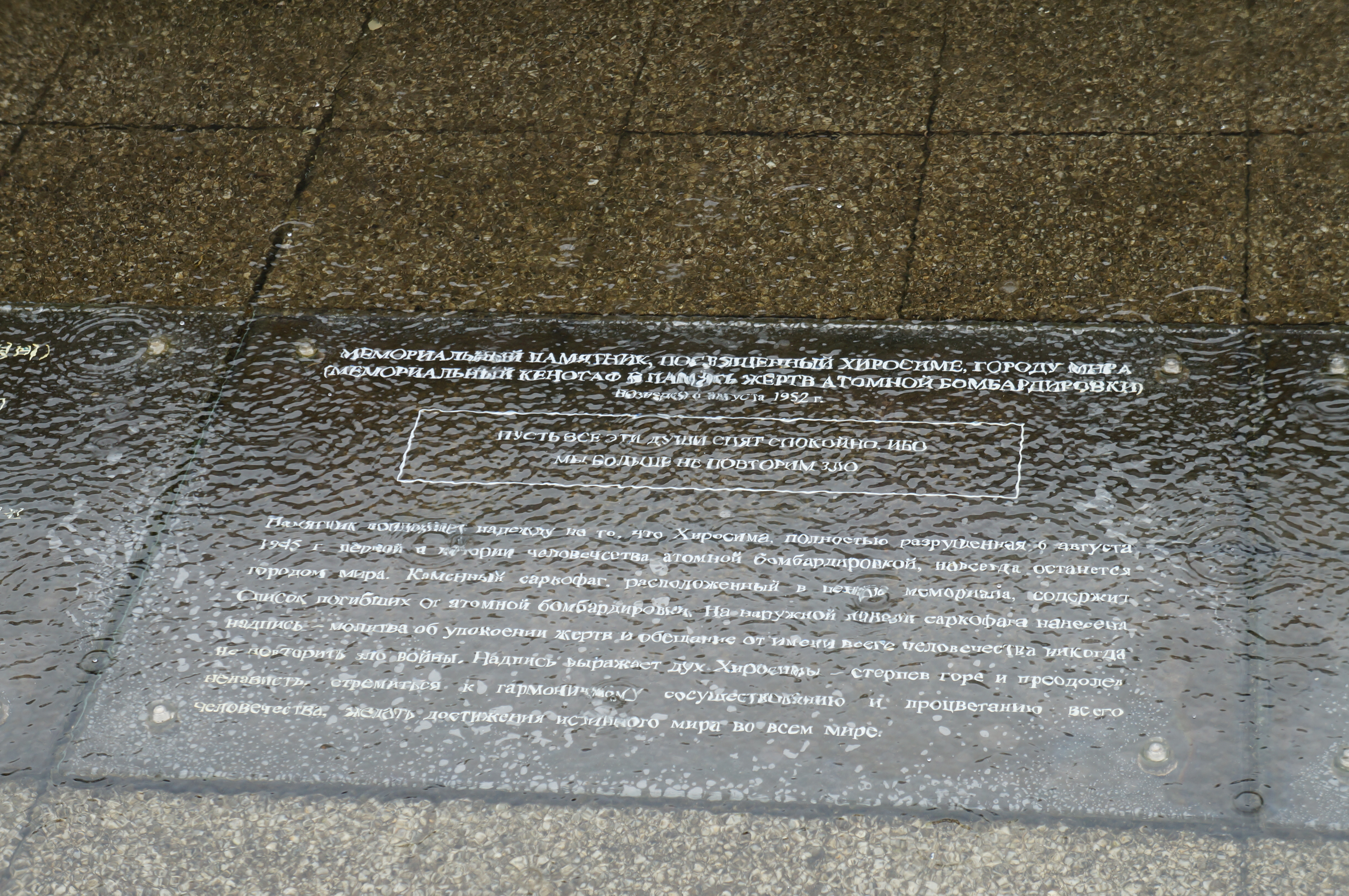 Памятная доска под водой, с русским текстом.